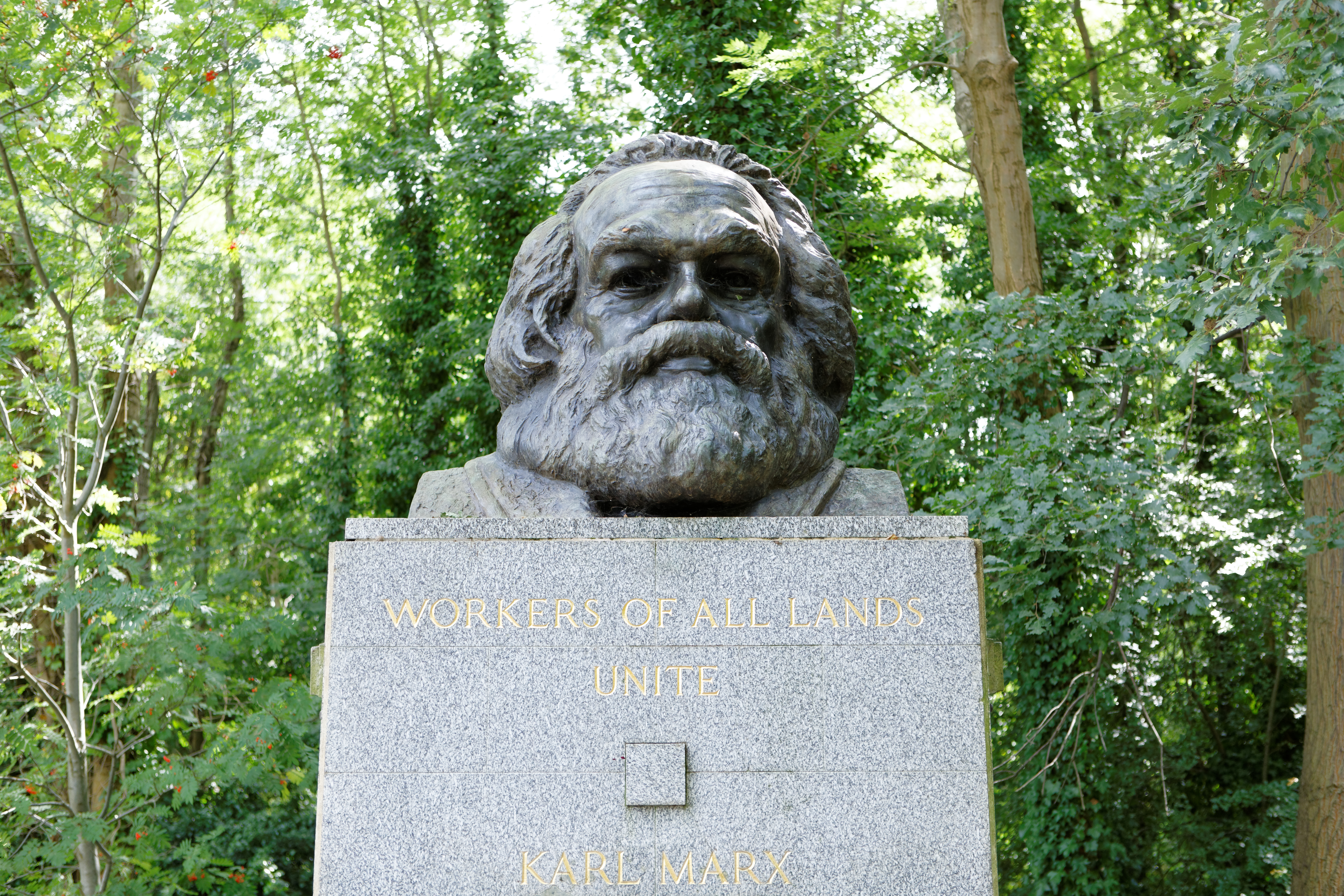 Sépulture de Karl Marx (1818-1883), philosophe, économiste, socialiste et communiste allemand.